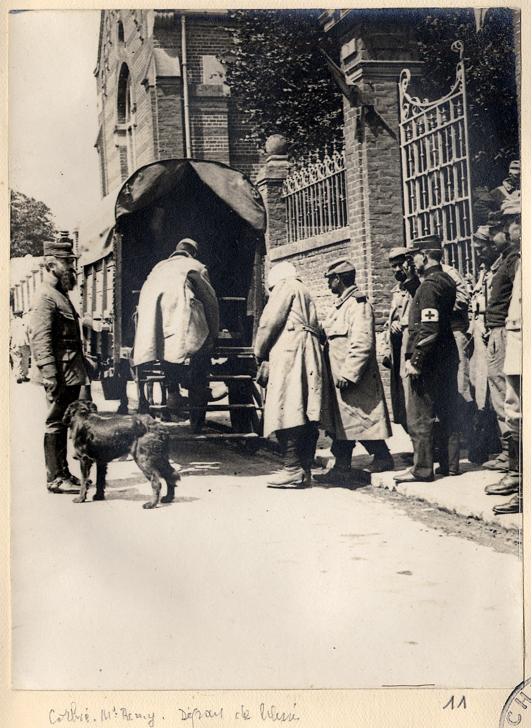 Les blessés quittent l'hôpital de triage de Corbie (Somme) pour être rapatriés dans un autre hôpital. Juin 1915. Guerre 1914-1918. Au premier plan M. Rémy avec un chien.